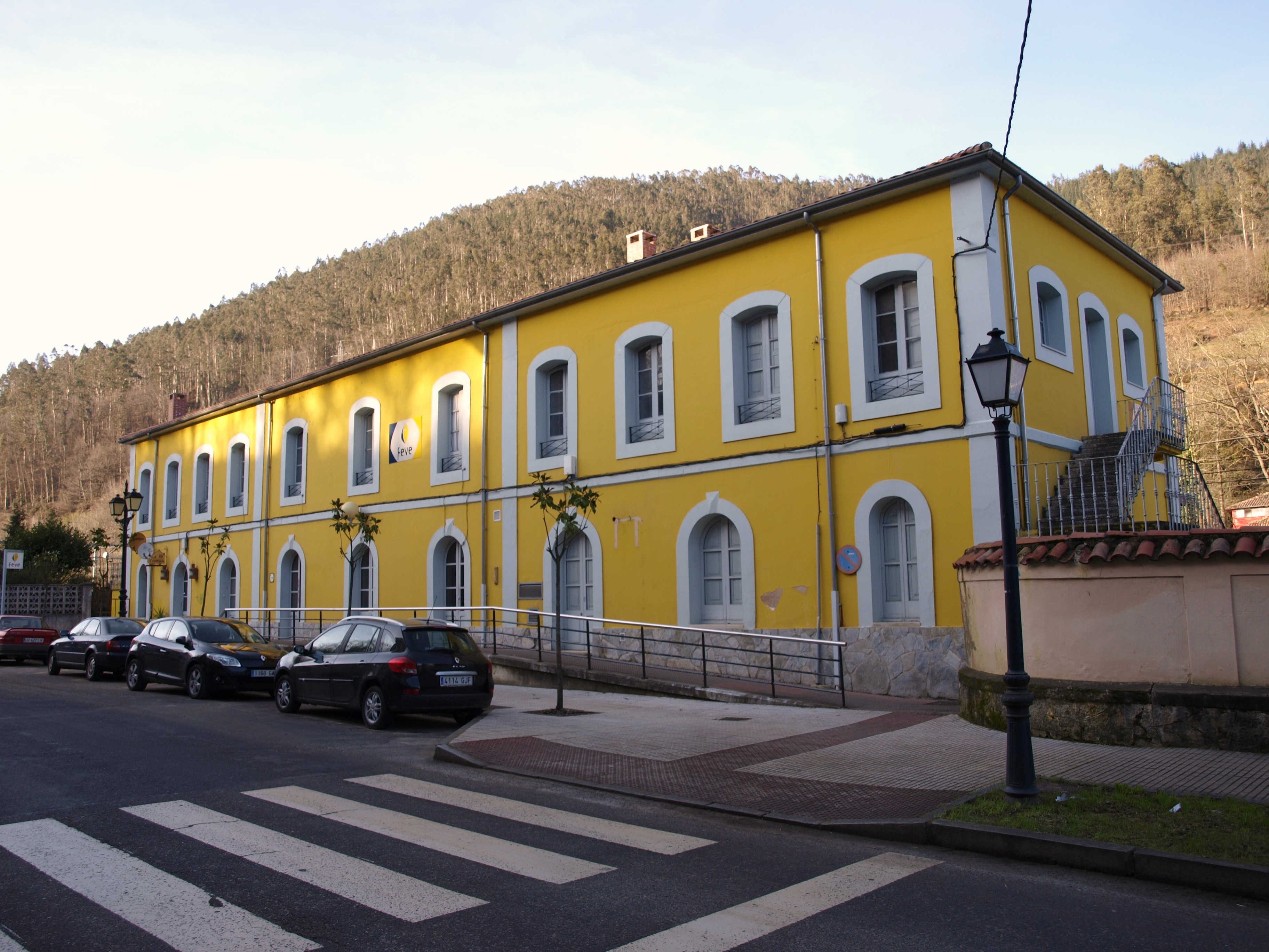 Estación Feve Infiesto